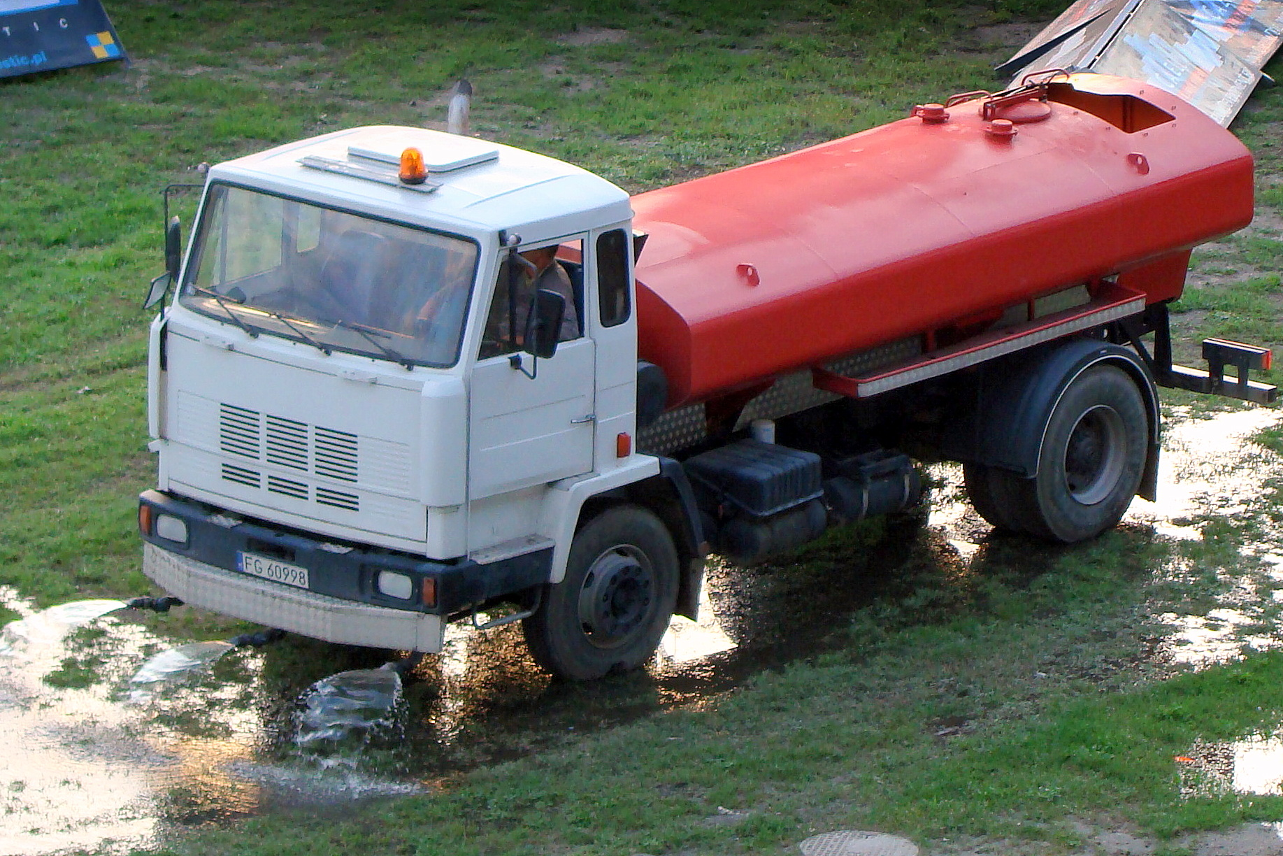 Jelcz 422 jako polewaczka uliczna (stadion żużlowy w Gorzowie Wlkp.)